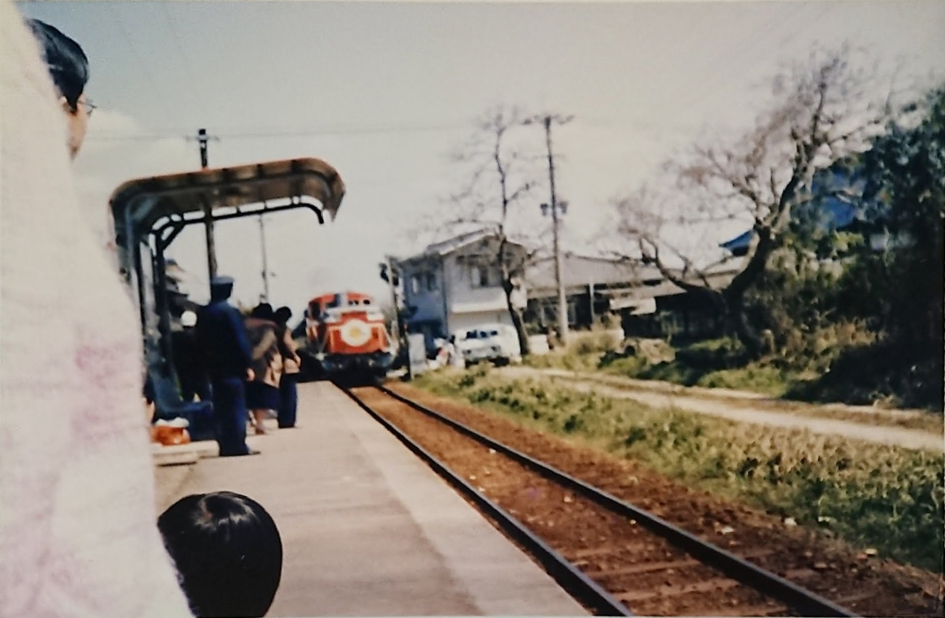 廃線の日の様子